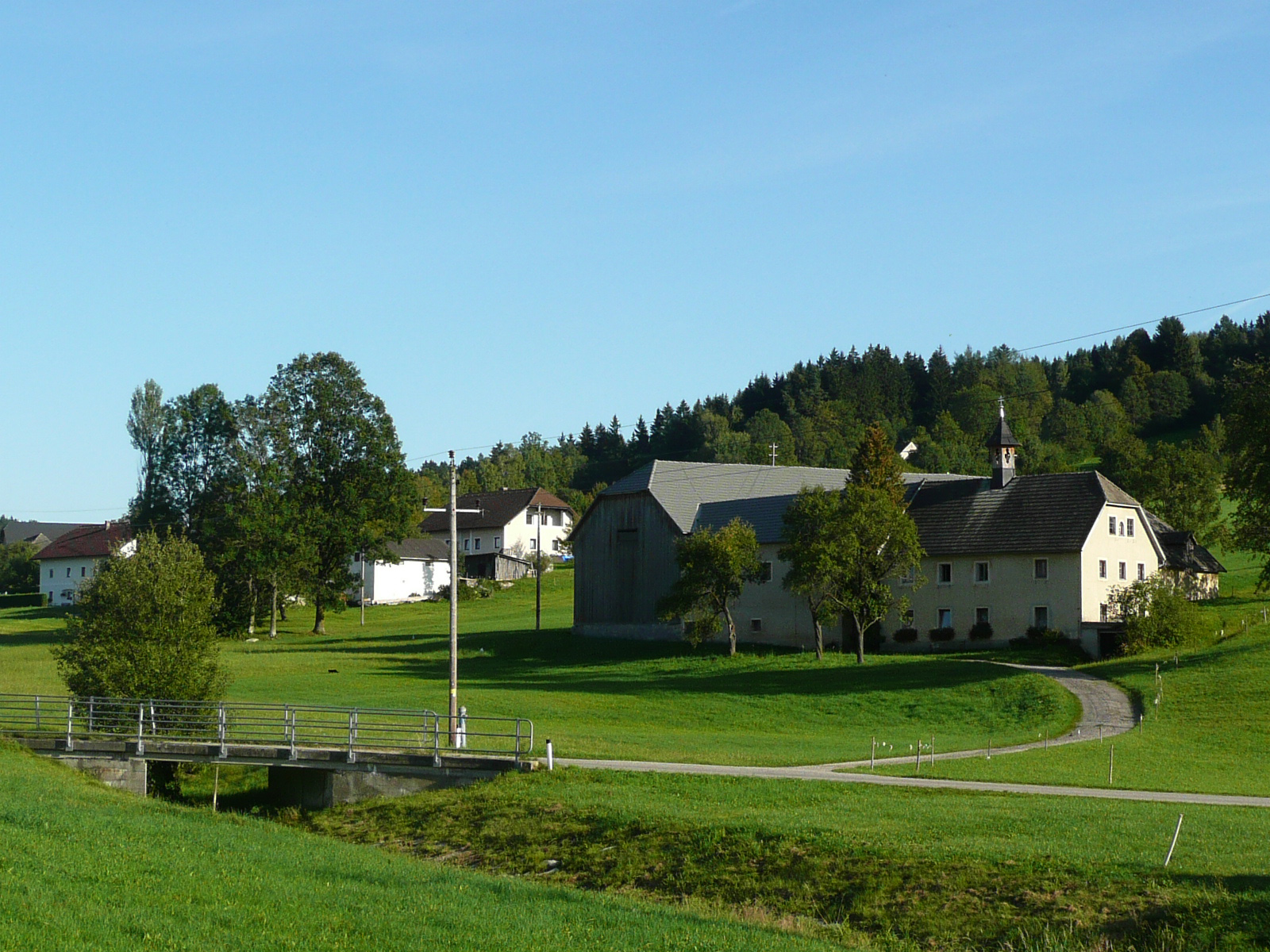 Bauernhof in Leopoldschlag, Ortsteil Mardetschlag